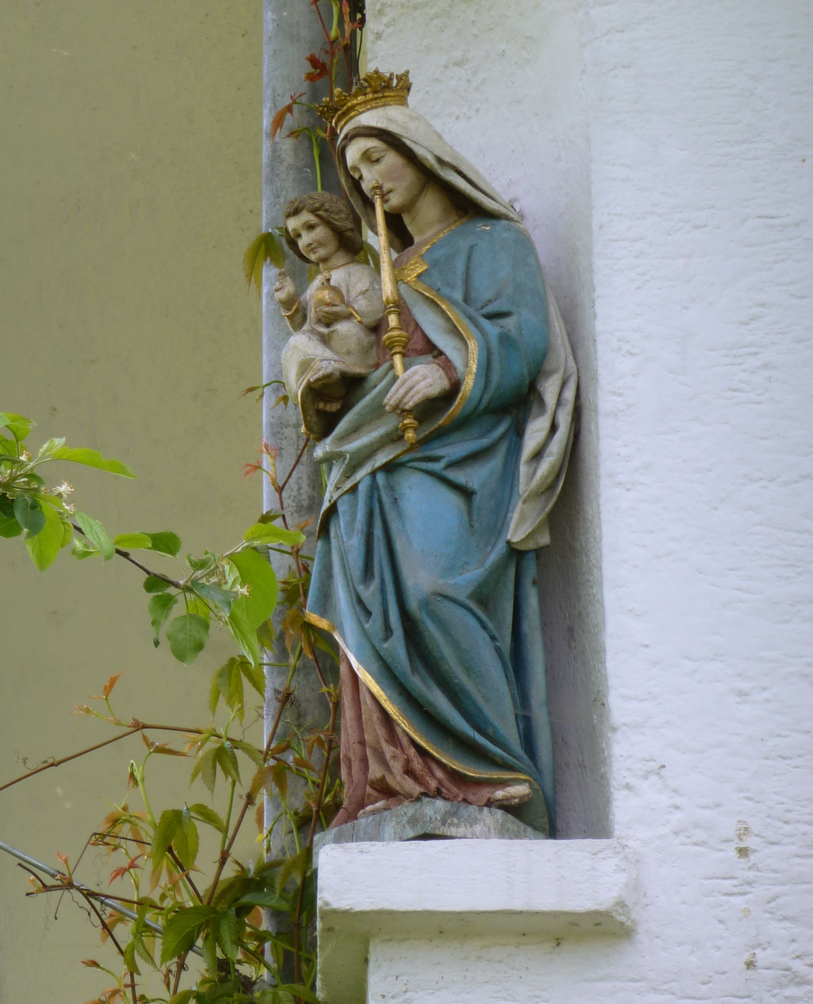 Kottgeisering, Schulstr. 2: Ehemaliges Pfarrhaus, Ansicht von N. Detail: Marienstatue (Maria mit Krone und Szepter) mit Kind (mit Weltapfel) an der NO-Ecke des ehemaligen katholischen Pfarrhauses